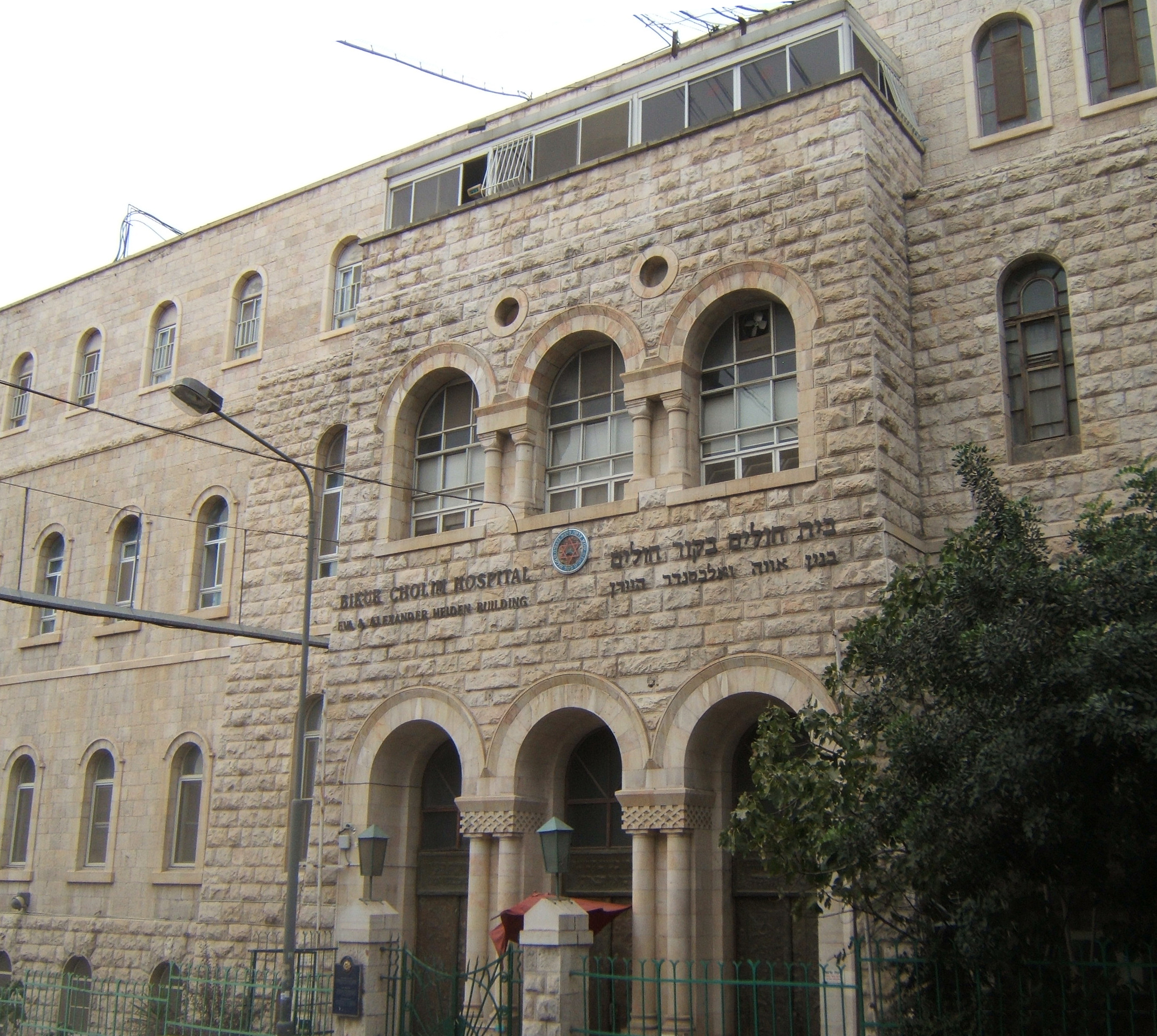 Bikur Cholim Hospital, Jerusalem